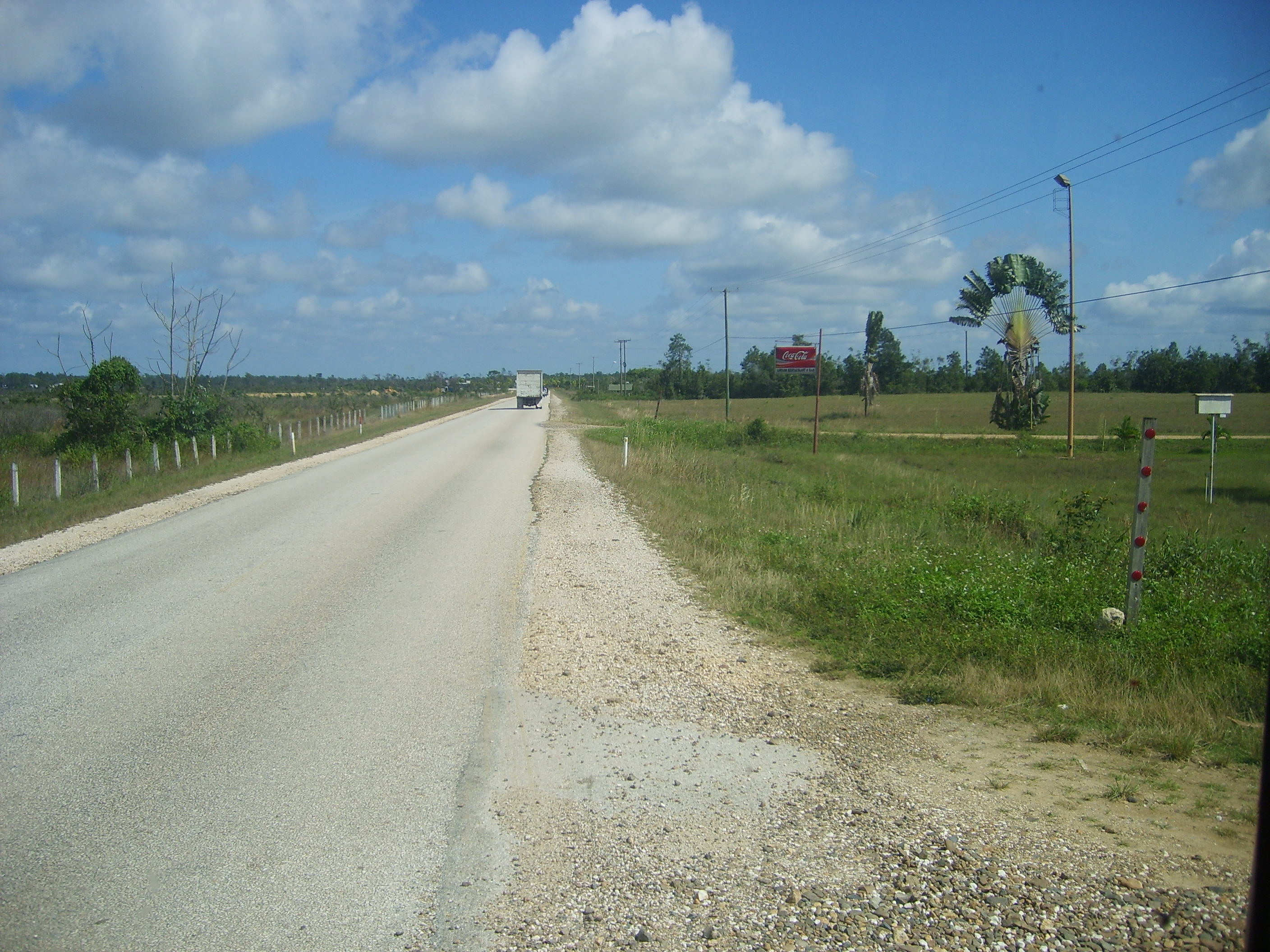 Western Highway in Belize between San Ignacio and Belmopan